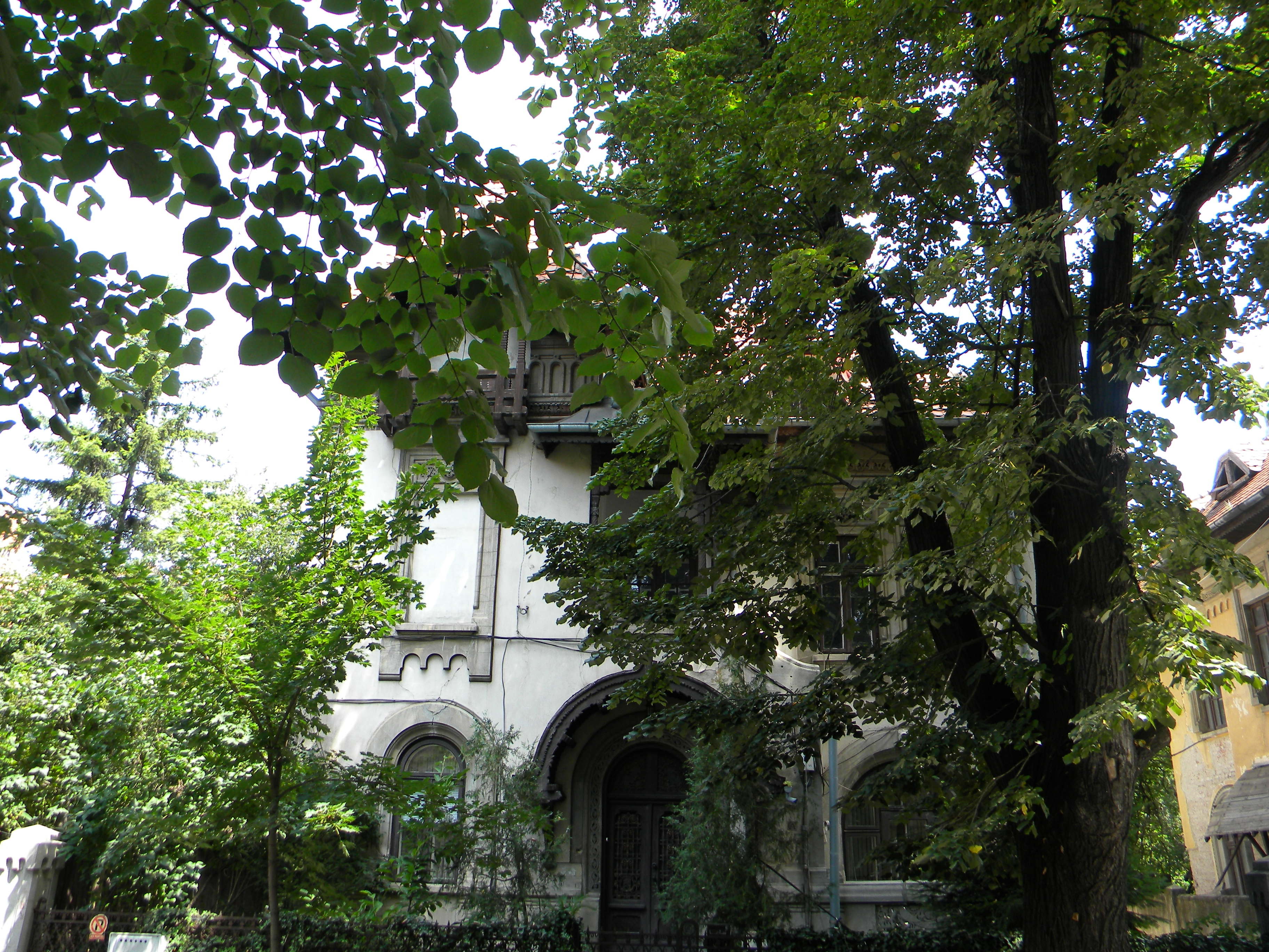 Bucuresti, Romania, Str. Haga, Vila nr. 7; B-II-m-B-18894